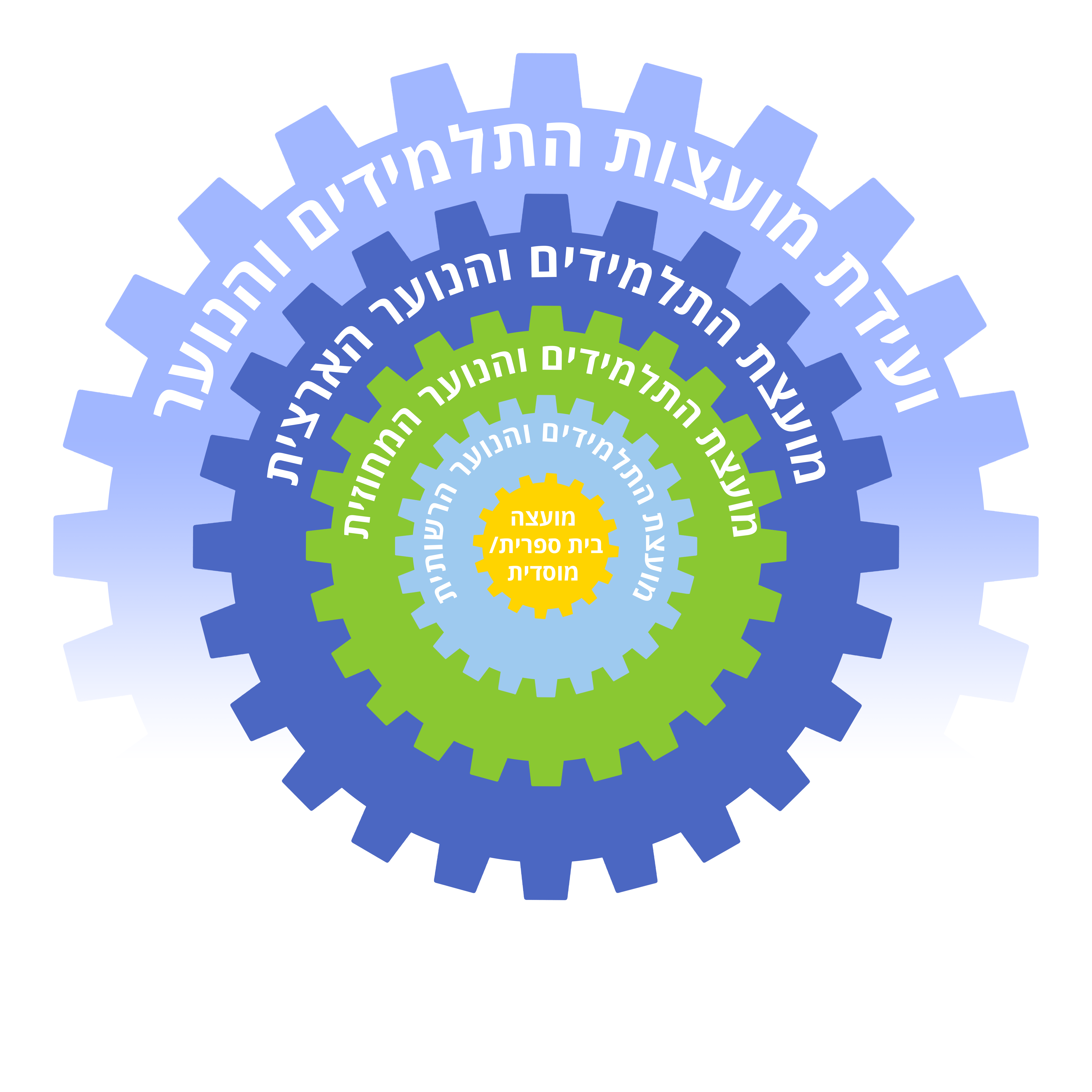 מבנה מועצות התלמידים והנוער בישראל